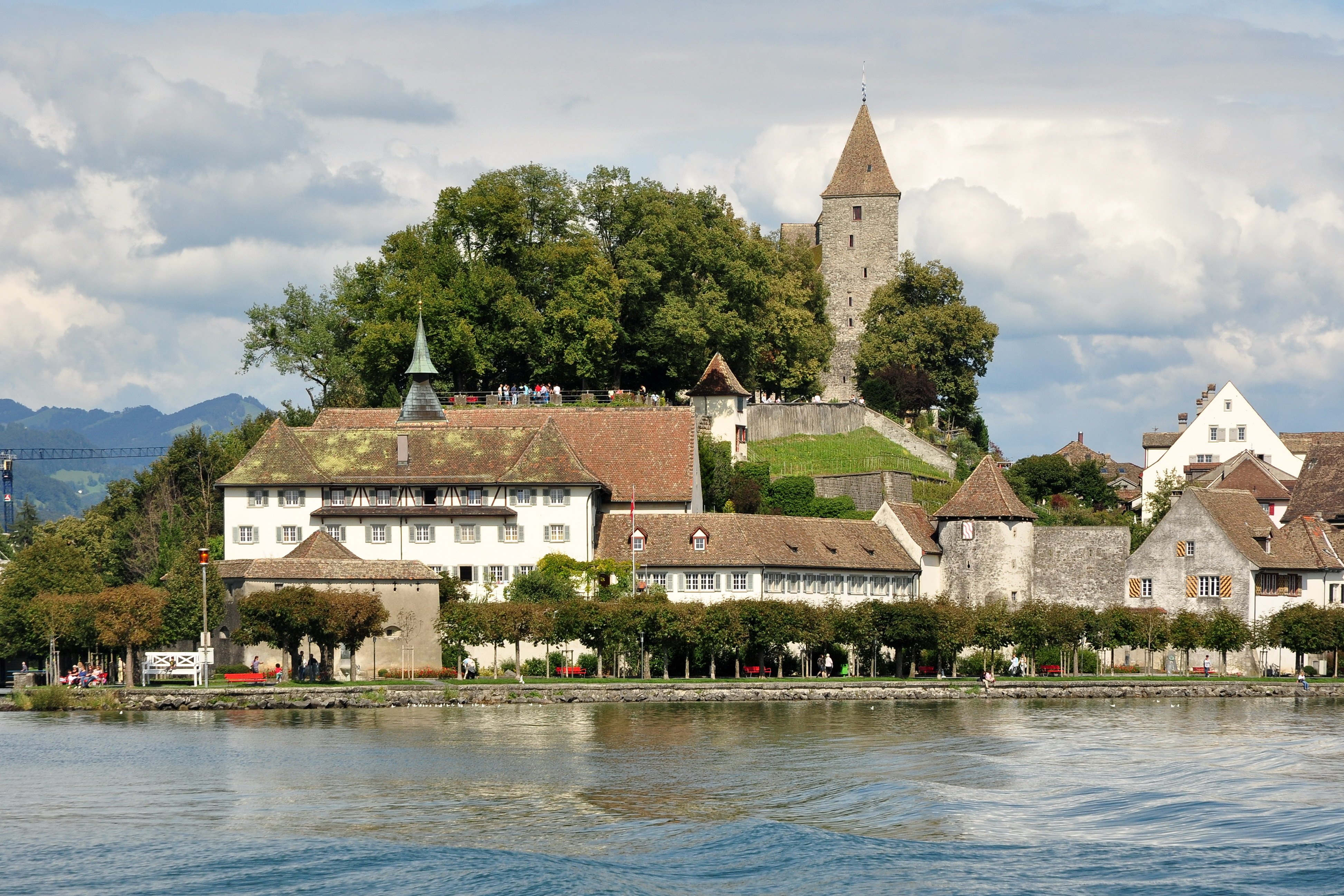 Rapperswil (Switzerland) : Lindenhof hill, Kapuzinerkloster, the castle (Schloss), and on lakeshore the Endingerturm tower and the Einsiedlerhaus building, as seen from Zürichsee-Schifffahrtsgesellschaft (ZSG) motorship Wädenswil.